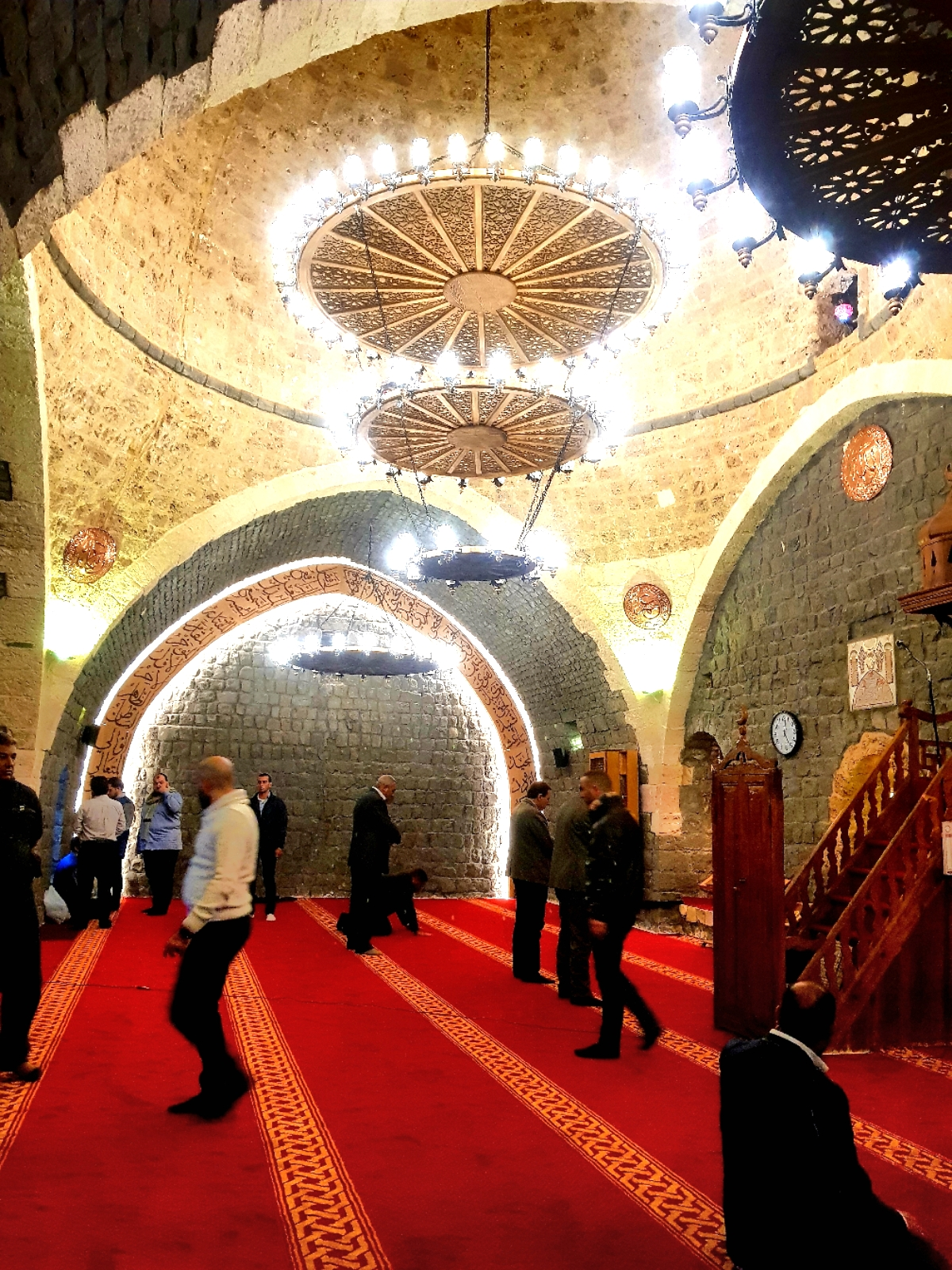 مسجد البيرة الأثري من الداخل \ عكار-شمال لبنان